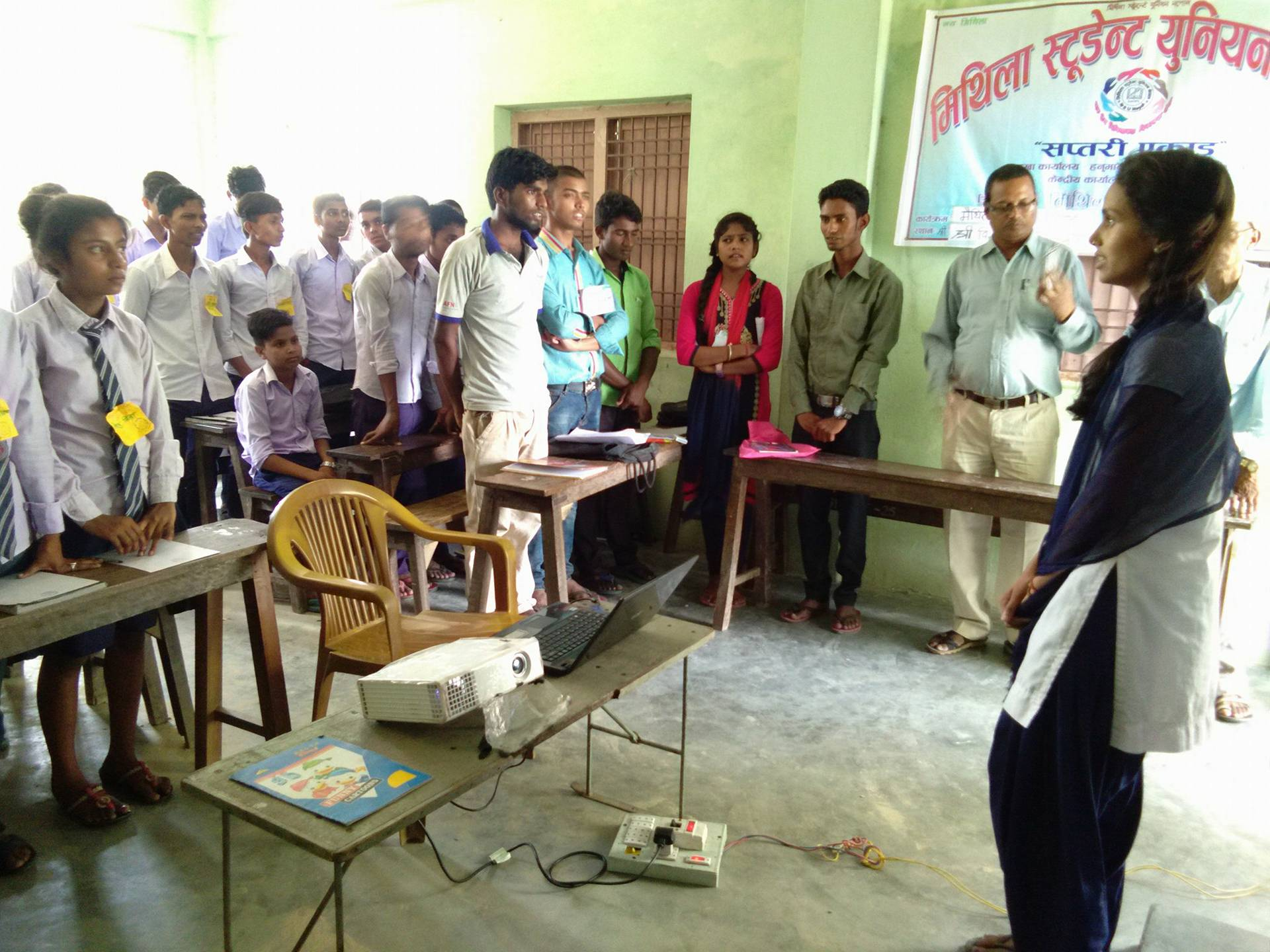 mithila student union